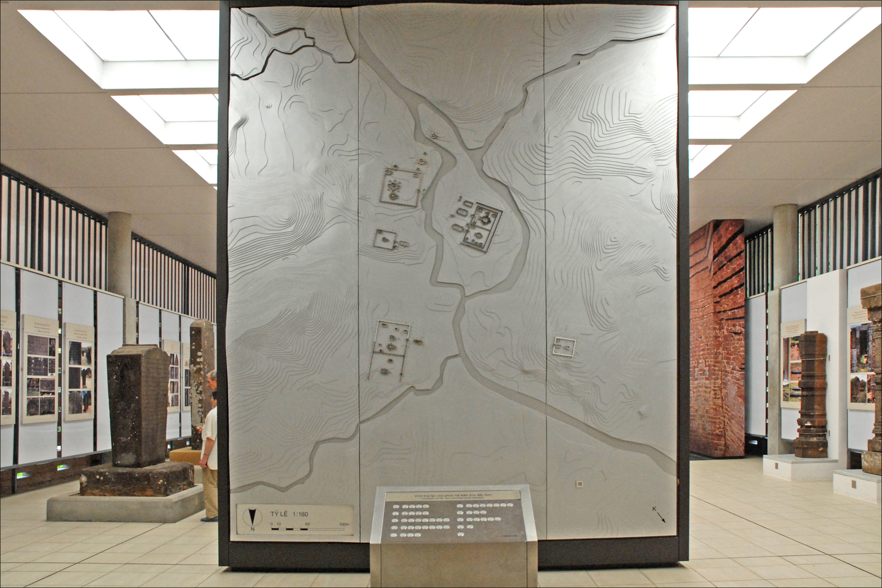 Le centre d'interprétation de My Son, avec au premier plan la carte interactive du site. Le site de My Son se situe à une trentaine de kilomètres de la ville de Hoi An au centre du Vietnam. Il s'agit de l'un des lieux les plus importants de l'ancien royaume Champa. Le site a été étudié par des scientifiques de l'Ecole Française d'Extrême Orient (EFEO) : Henri Parmentier (1871-1949) et ses successeurs. Bien que très endommagé, My Son, construit à partir du 7ème siècle, demeure un site historique, classé au patrimoine mondial par l'UNESCO. Ce site, sacré pour les Cham, comprend environ 70 ouvrages architecturaux de briques et de pierres au cœur d'une nature foisonnante. Ces édifices étaient tous ornés de frises sculptées et autres décors, propres à l’art Cham. Les oeuvres majeures sont présentées au musée Cham de Da Nang. L'objet de culte dans les temples principaux de My Son est le linga, symbole de Shiva - protecteur des rois Cham. Le site, proche de la piste Ho Chi Minh, a été en grande partie détruit par des bombardements américains durant la guerre. voir les photos du site prises au début du 20ème siècle